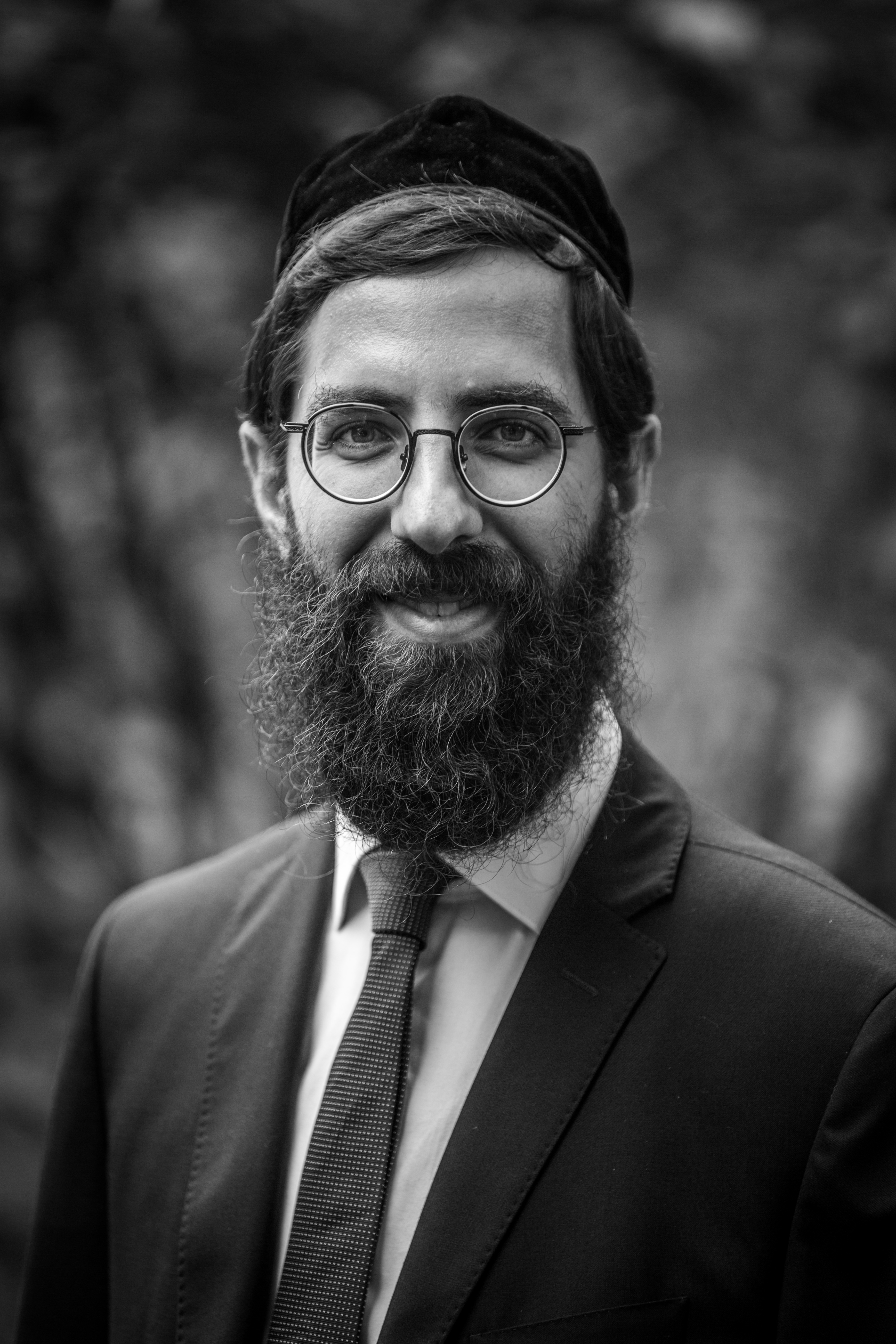 Harold Weill, grand-rabbin de Strasbourg.